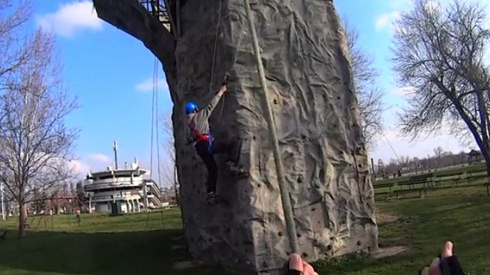 драјтулинг полигон на вештачкој стени на Ади Циганлији